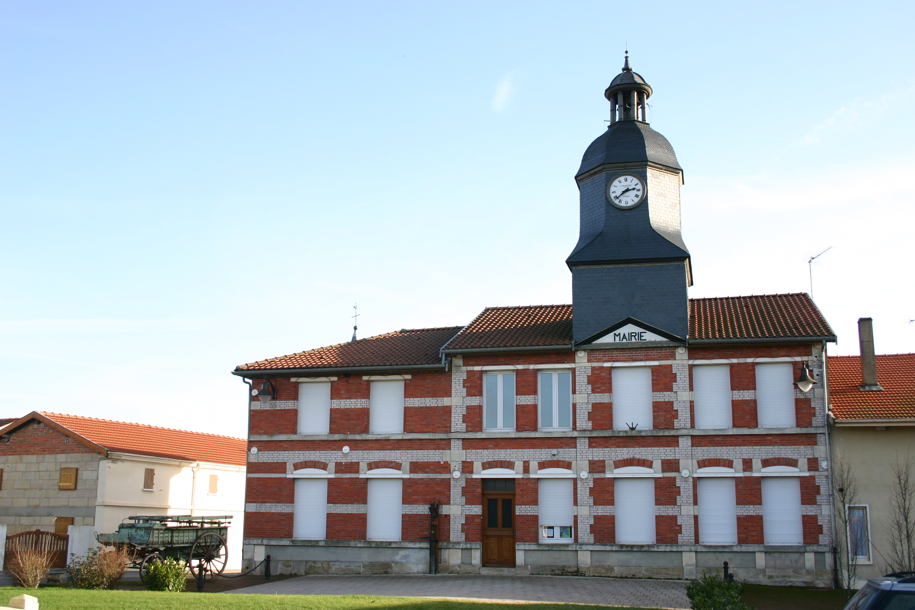 La Mairie de Possesse (Marne)